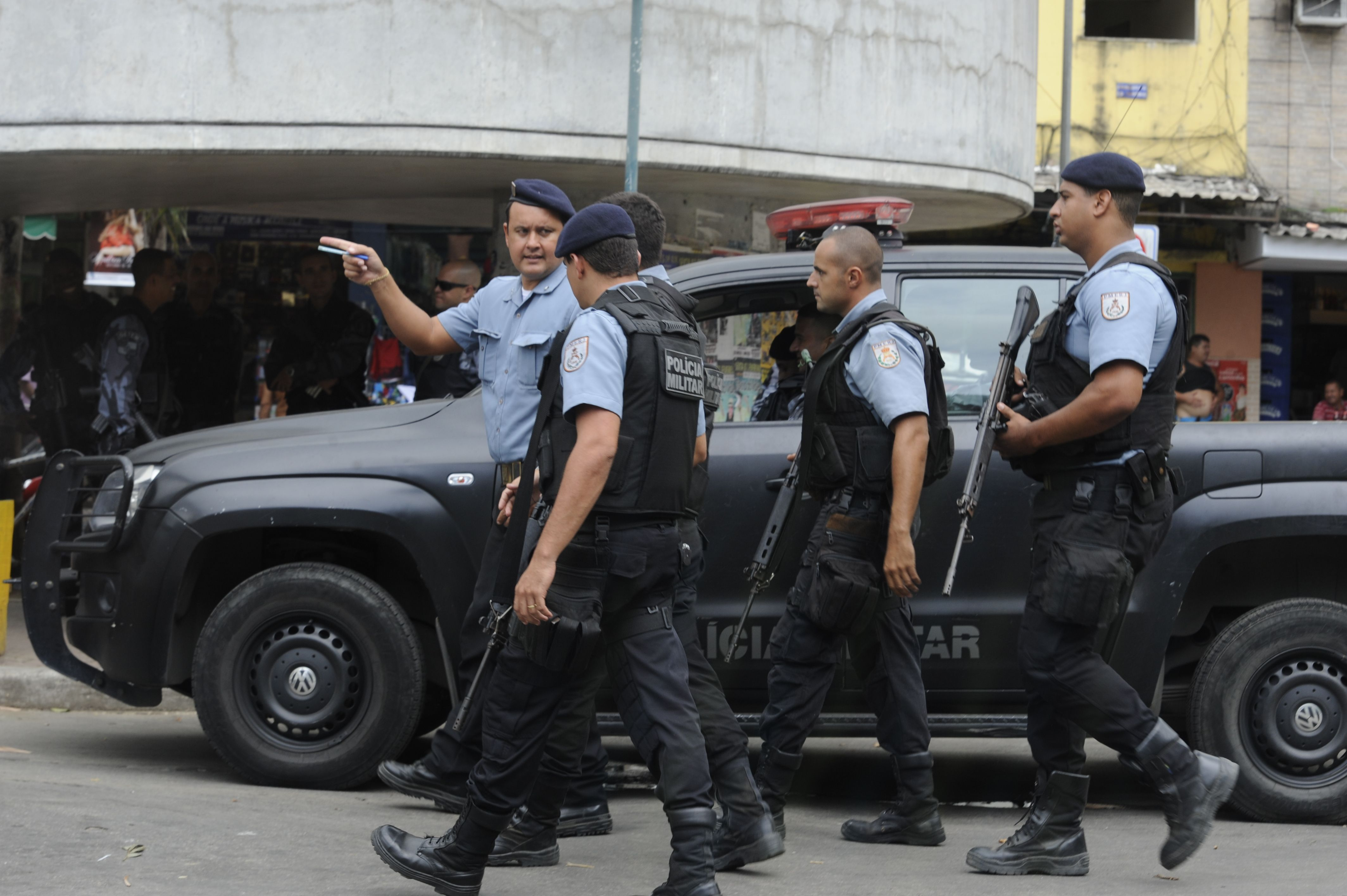 Polícia reforça segurança na Rocinha depois de tiroteio